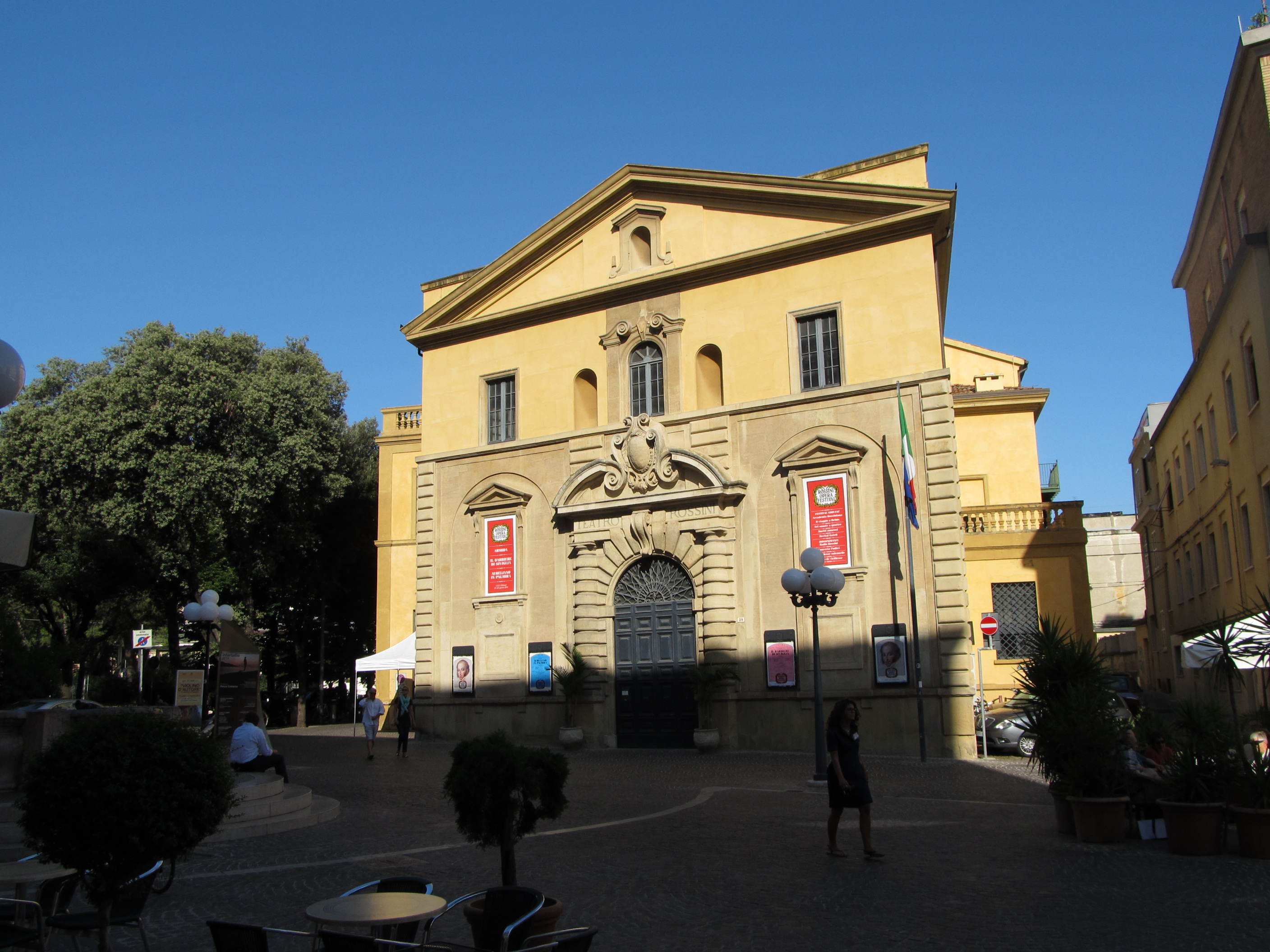 Teatro Rossini This is a photo of a monument which is part of cultural heritage of Italy.